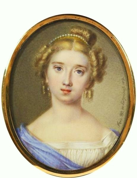 Екатерина Илларионовна Васильчикова (ум. 1842), в замужестве Лужина.